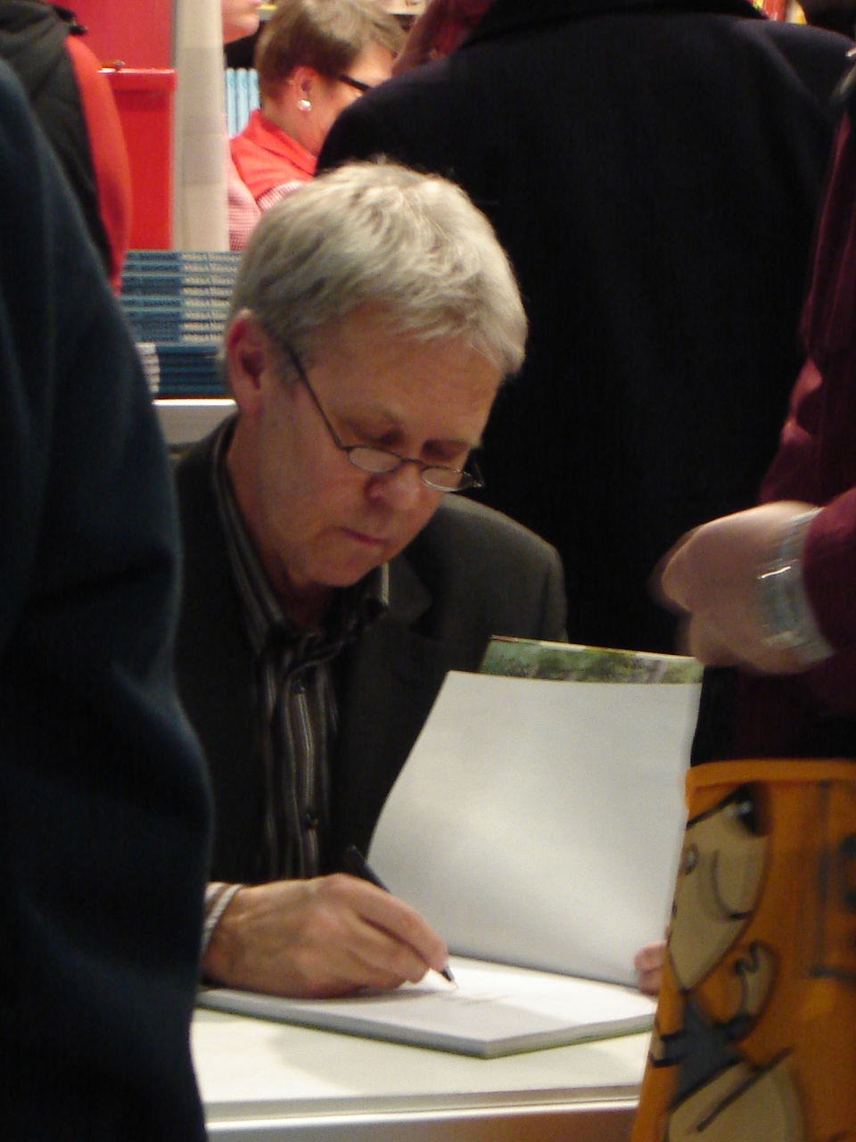 Mauri Kunnas, Jyväskylän Kirjamessut 12. huhtikuuta 2008.